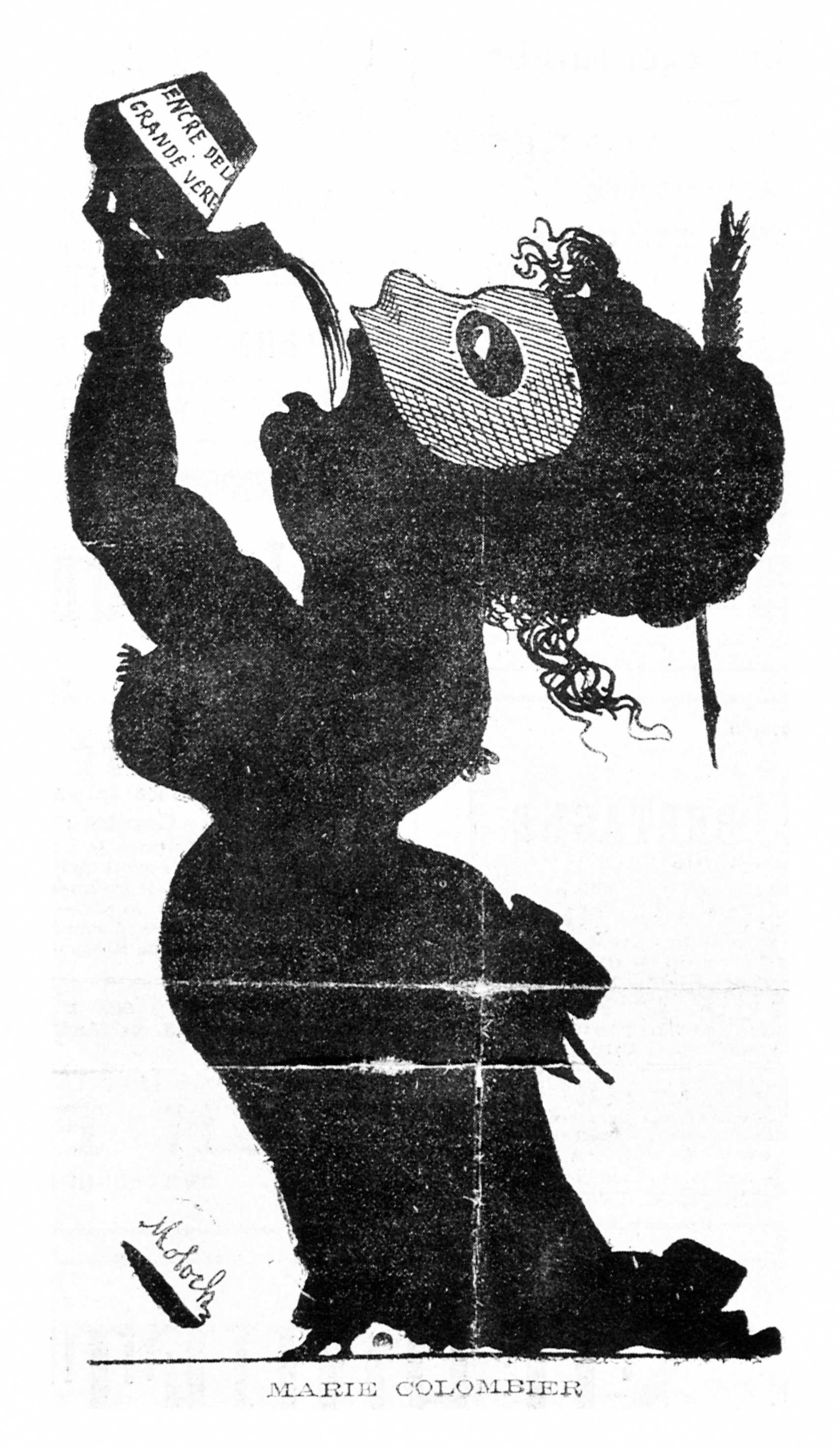 Hector Moloch Marie Colombier Caricature in La Silhouette circa 1884